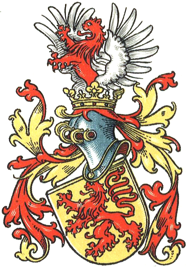 Wappen derer Sloer (auch Schloer/Slore), ritterbürtiger Adel des Niederstift Münster.